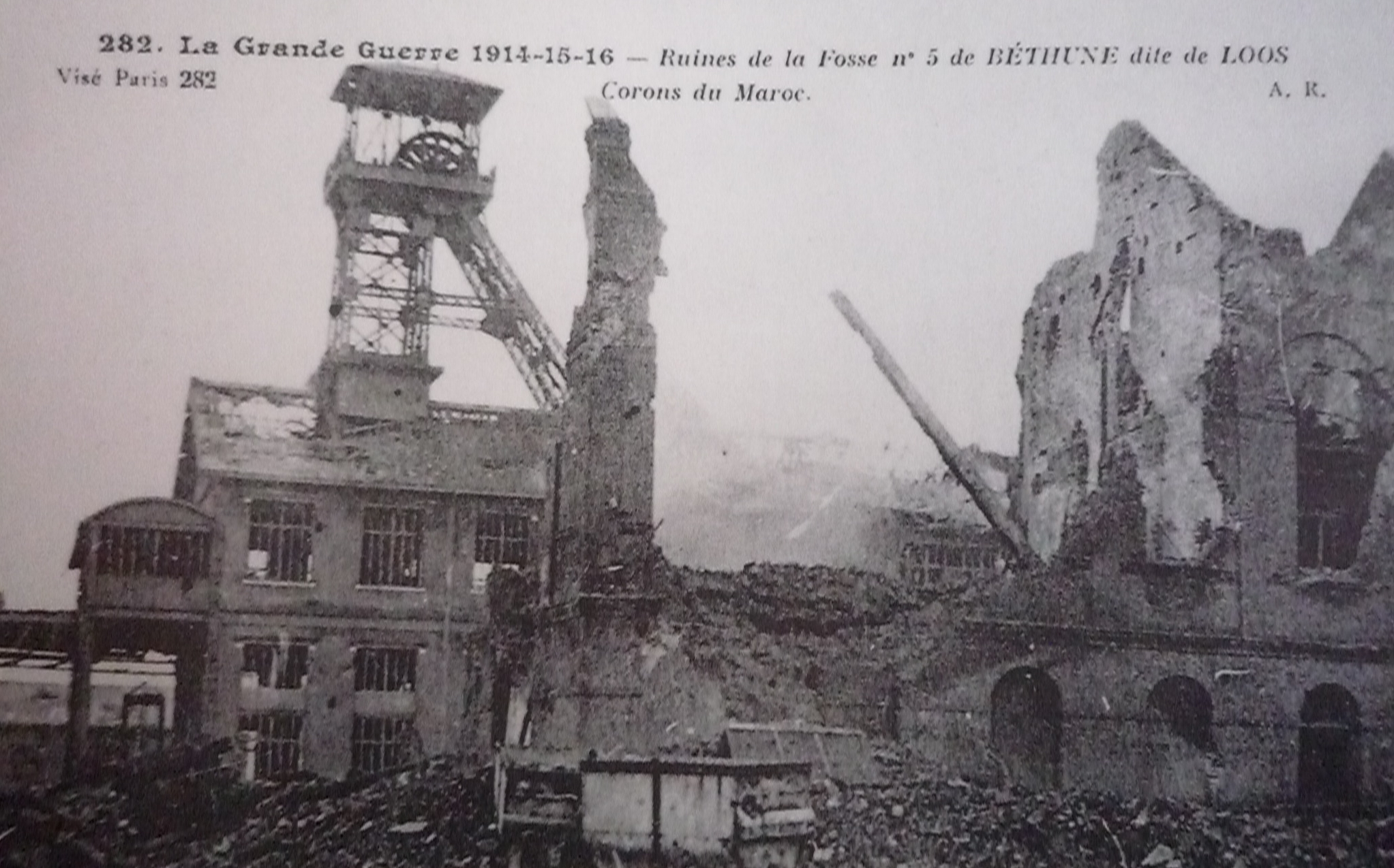 La Fosse n° 5 - 5 bis de la Compagnie des mines de Béthune était un charbonnage constitué de deux puits situé à Loos-en-Gohelle, Pas-de-Calais, Nord-Pas-de-Calais, France.